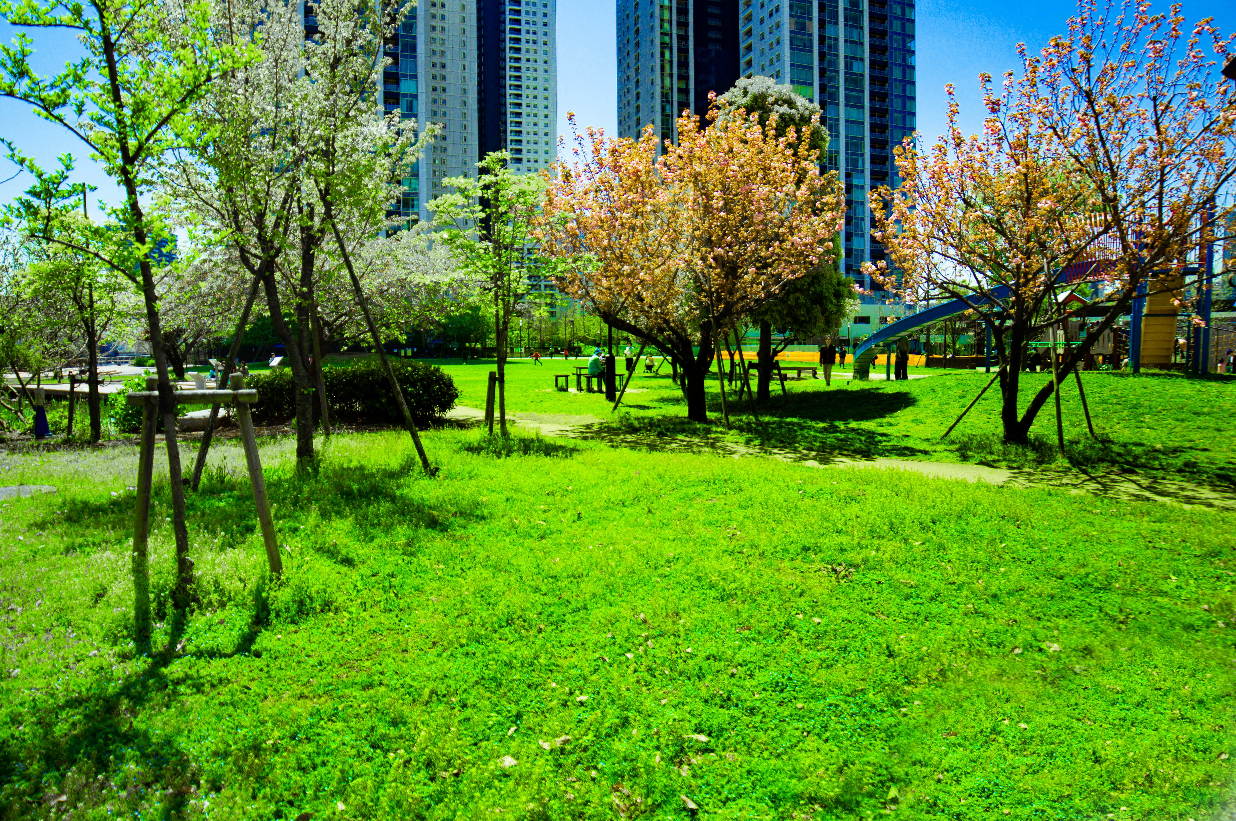 港南緑水公園北側からの画像 Sony SLT-A57